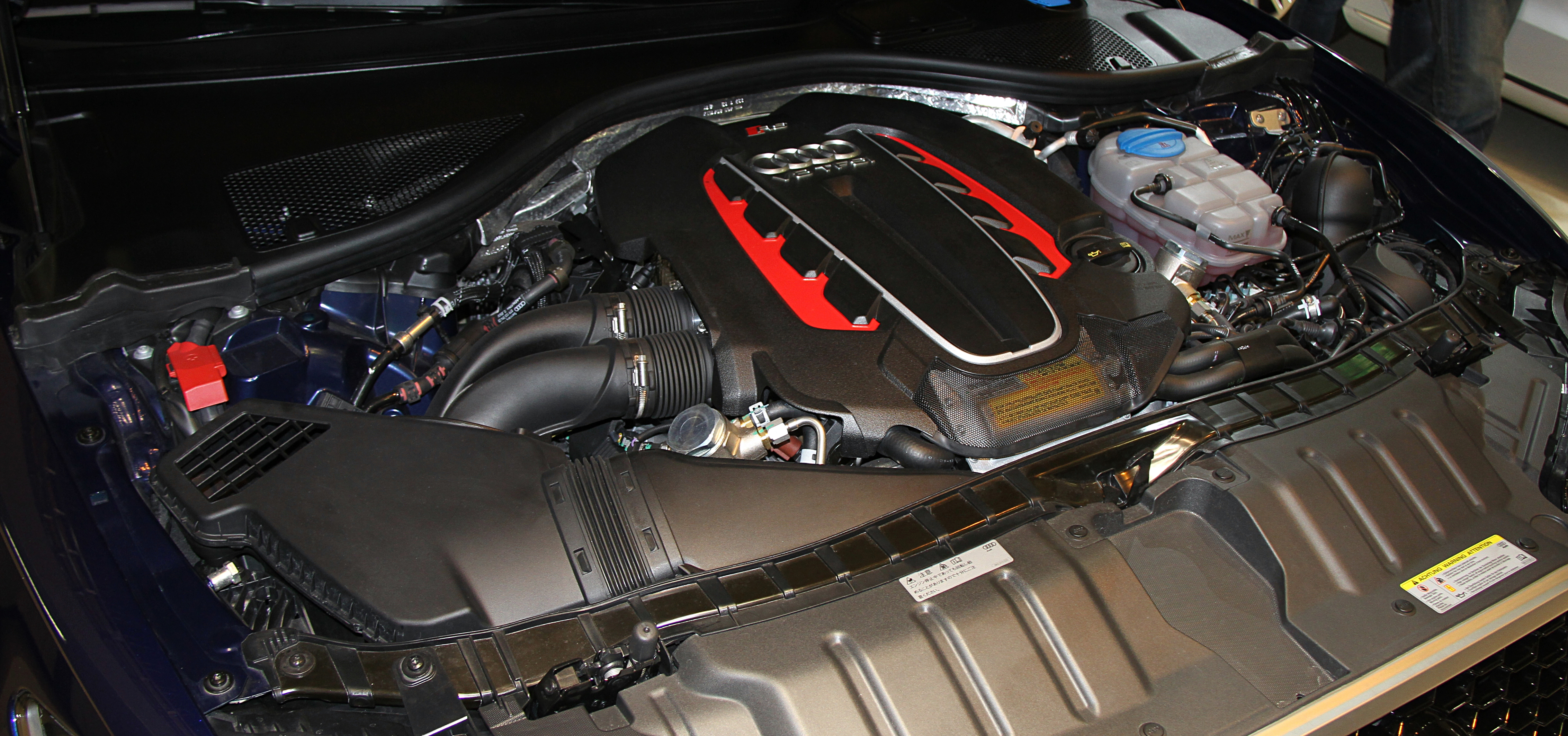 Audi RS6 Avant